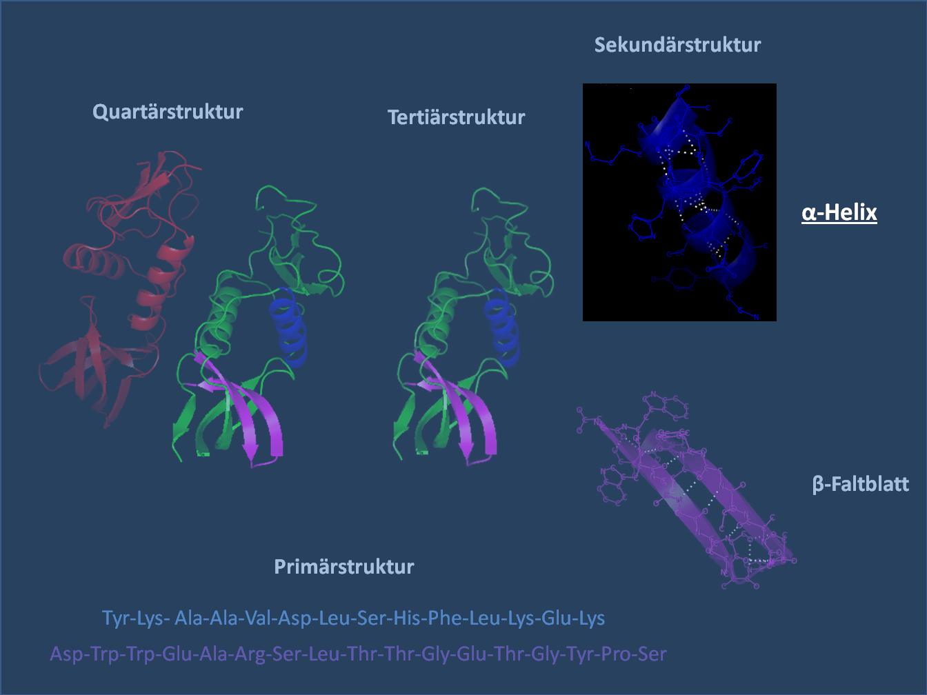 Faltung des Proteins 1EFN mit Fokus auf die α-Helix